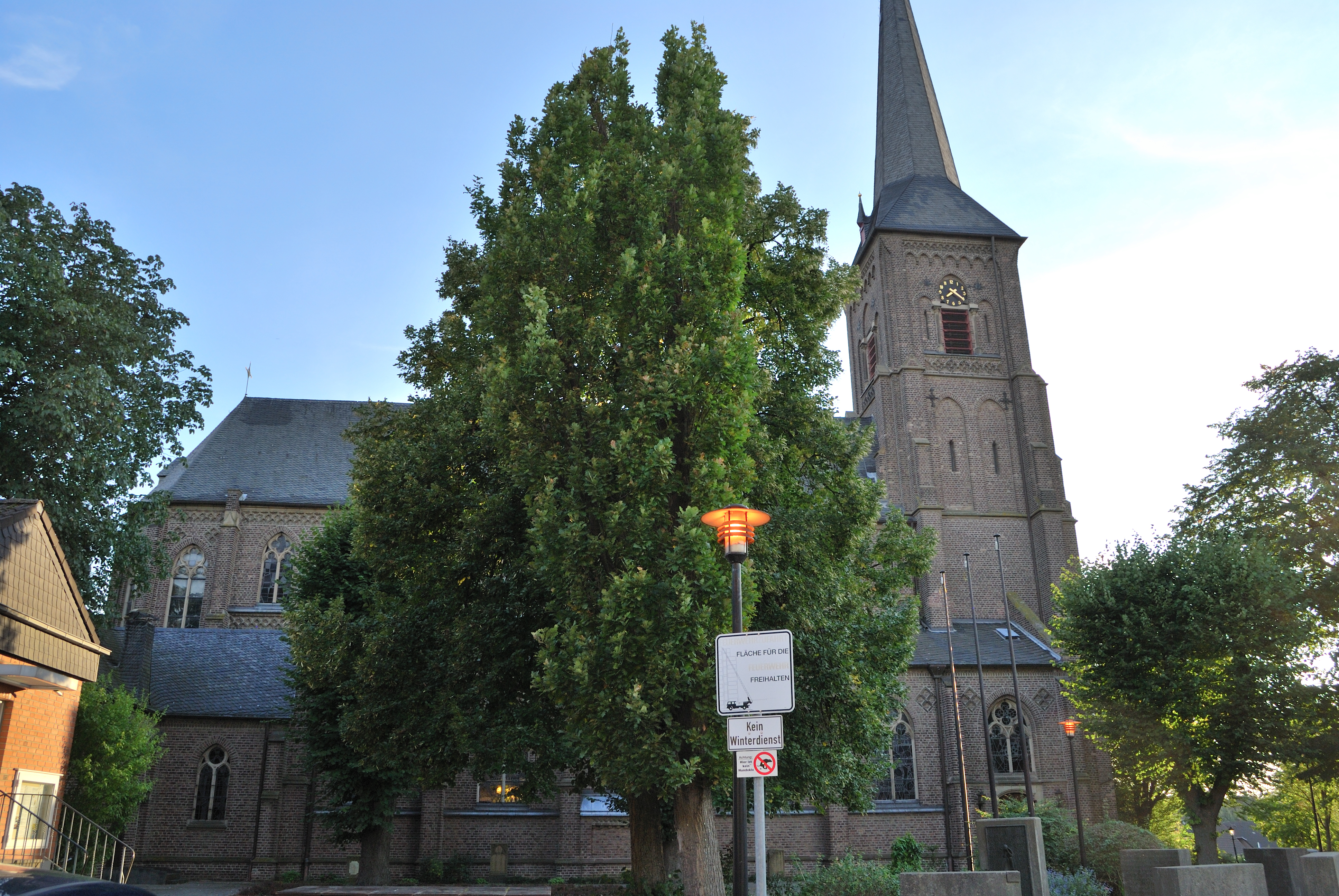 Denkmalnummer 150